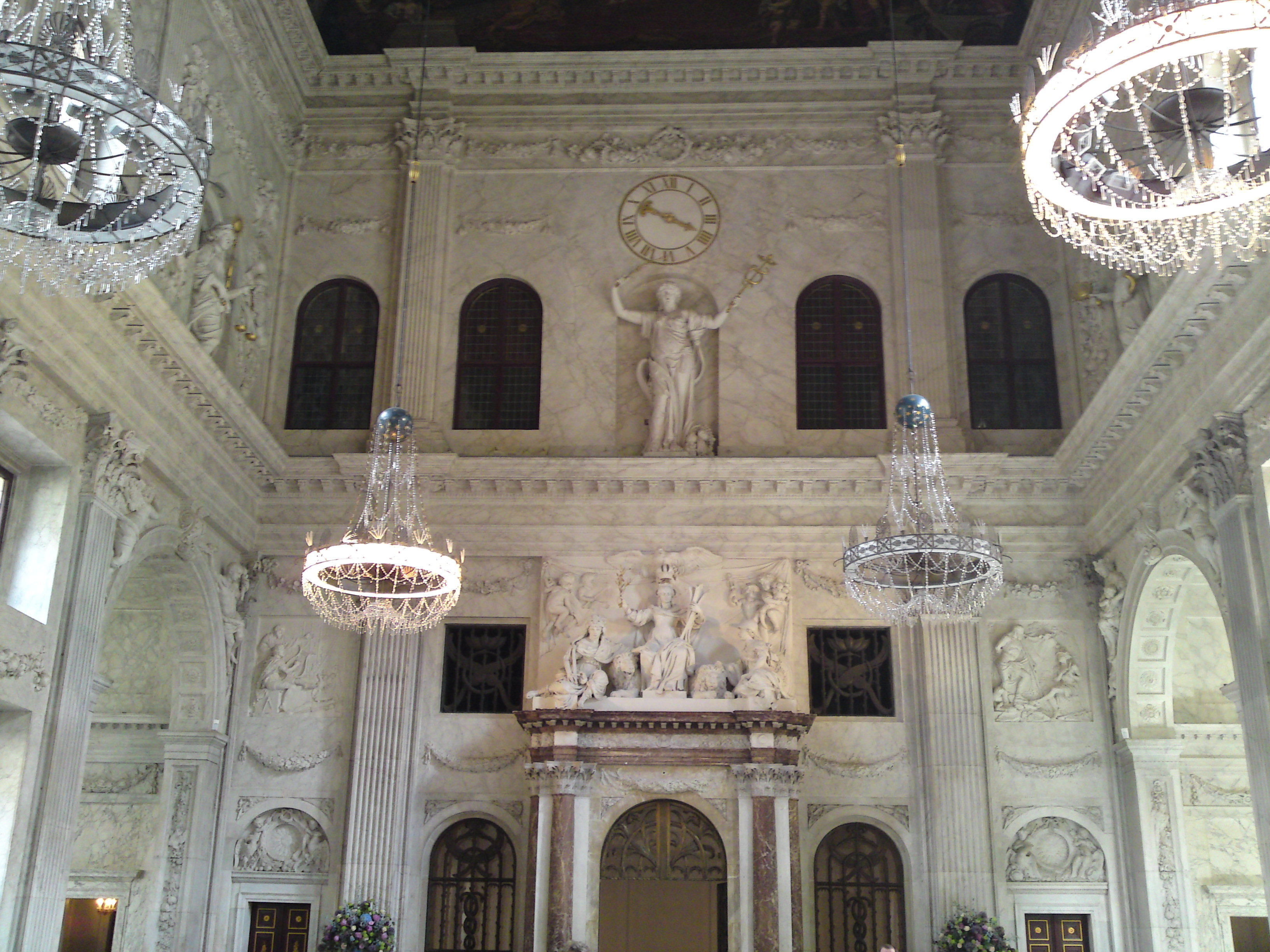 Overzicht van de Burgerzaal richting de ingang in het Paleis op de Dam.